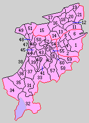 後の島根県簸川郡域の町村制時点の町村。